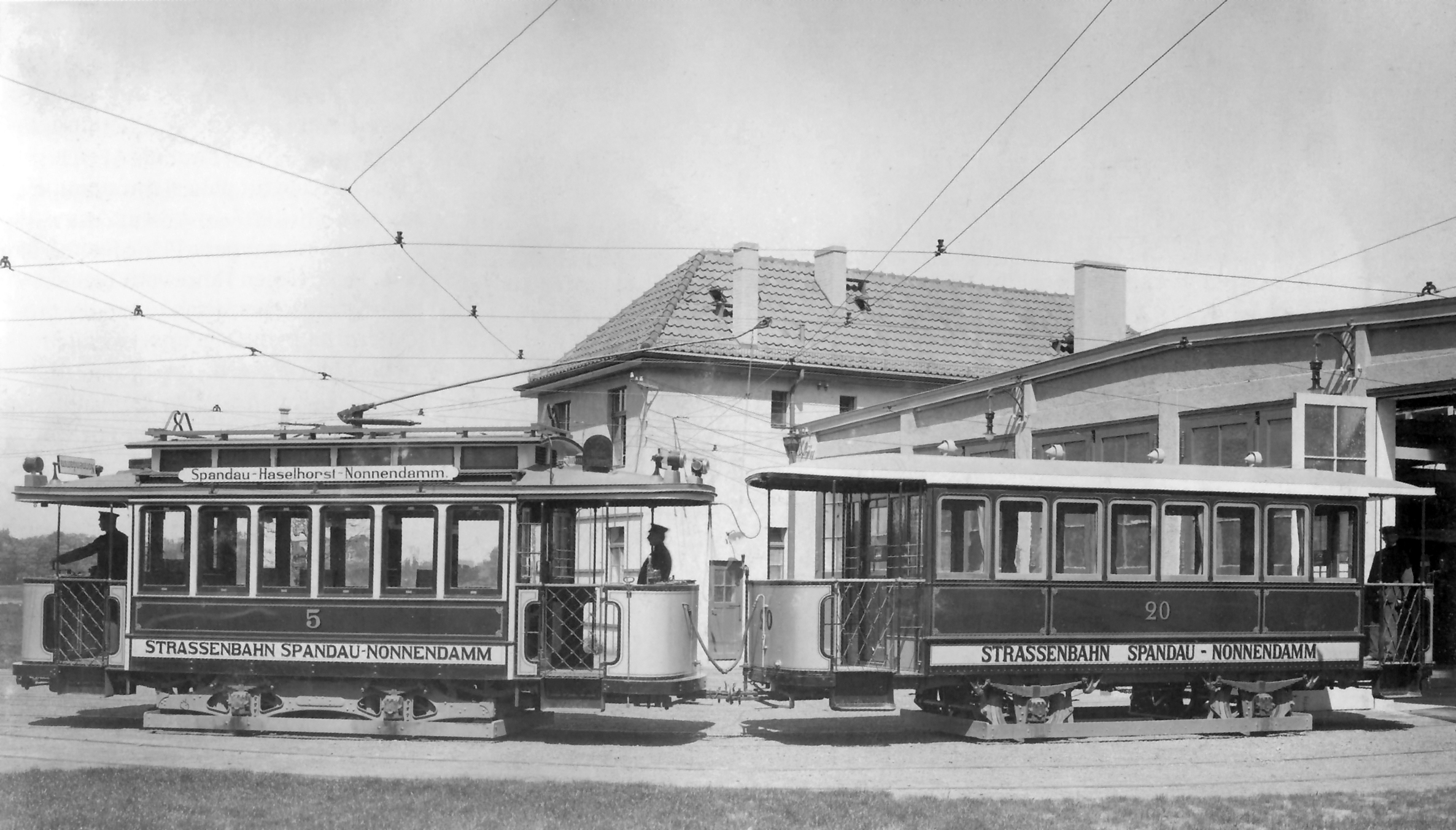 Triebwagen 5 und Beiwagen 20 der Elektrischen Straßenbahn Spandau–Nonnendamm vor dem Depot